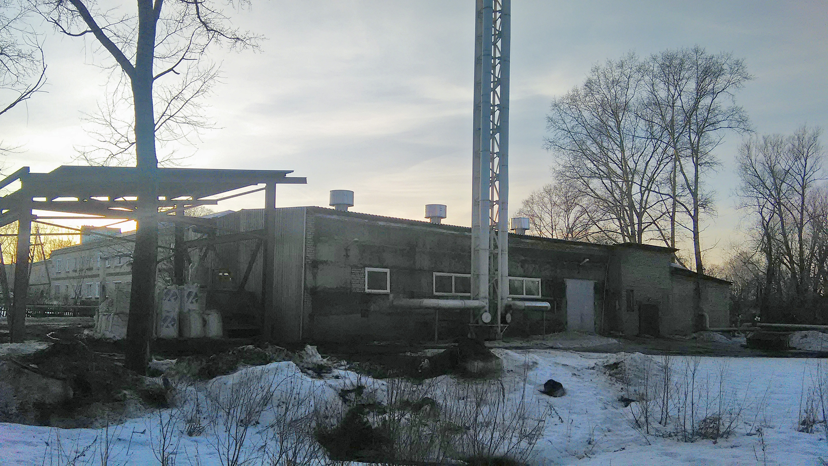 Вид на котельную возле Библиотеки — Шахунья